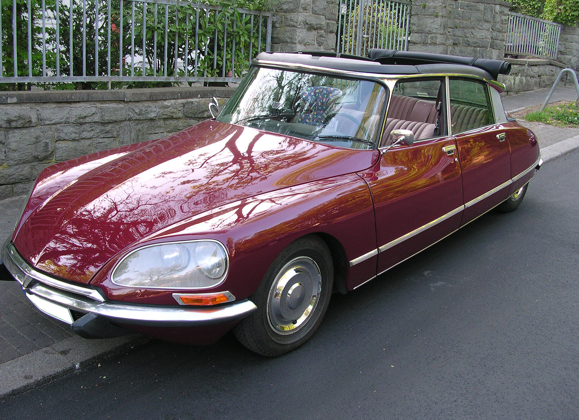 Citroën DS Cabrio mit 4 Türen, gesehen in Wiesbaden